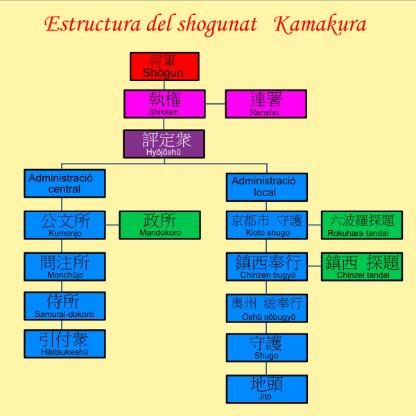 Organigrama